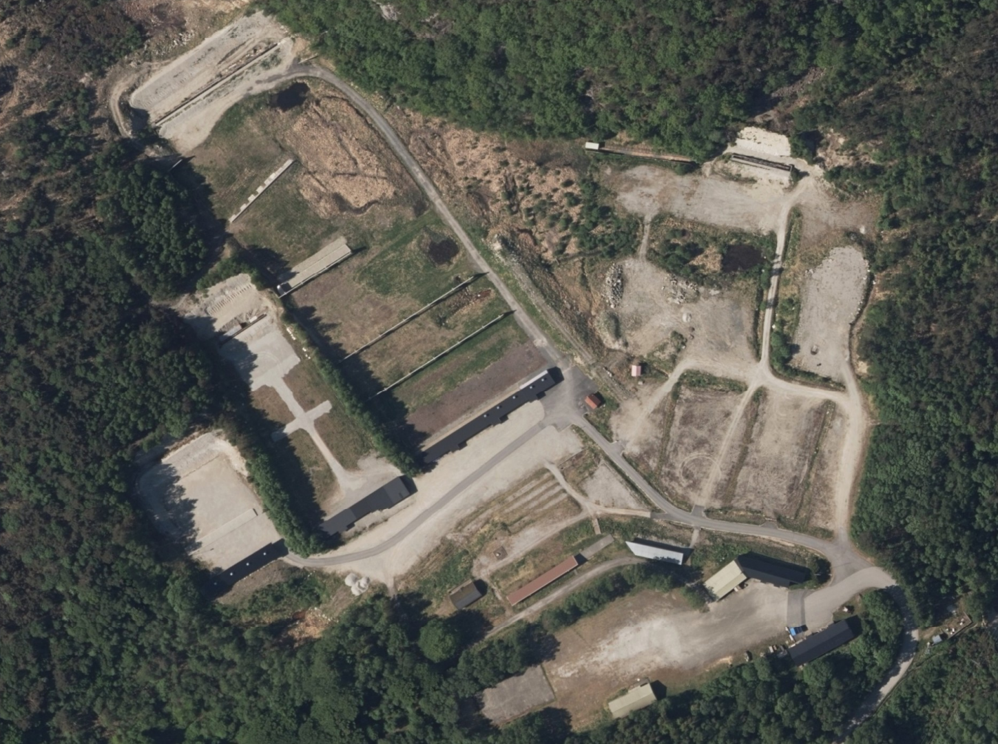 Flyfoto av Vatne Skytebane